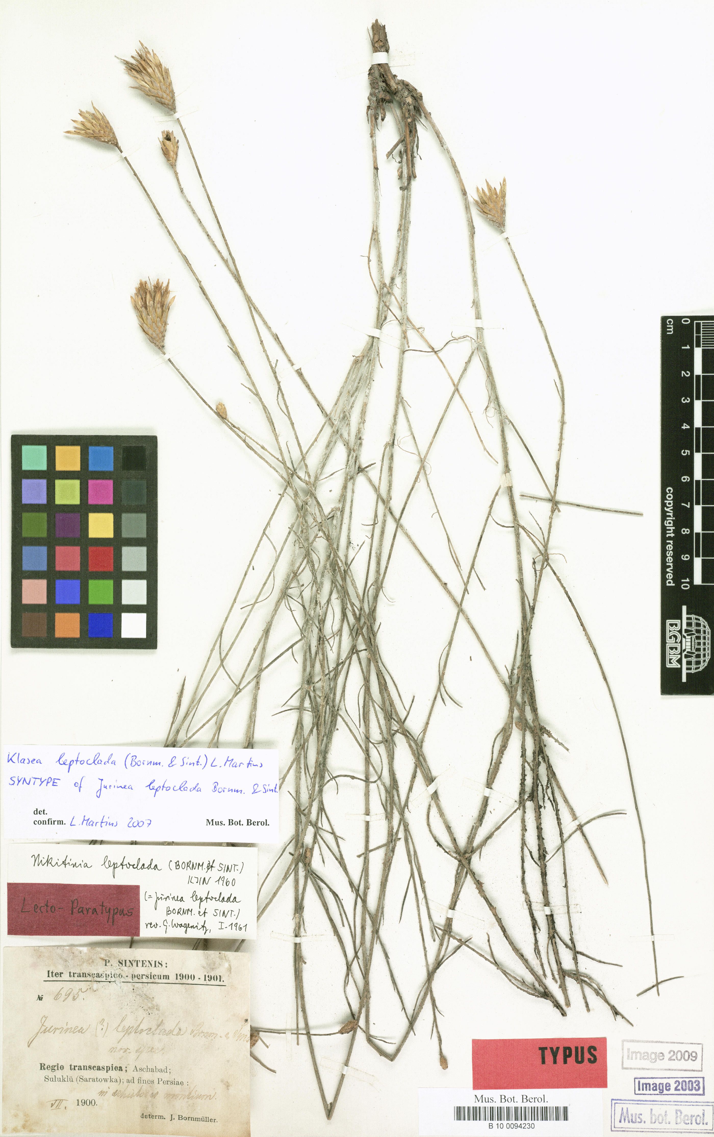 Nikitinia leptoclada - Tipo - Turkmenistan: Regio transcaspica; Aschabad, Suluklü (Saratowa), ad fines Persiae.